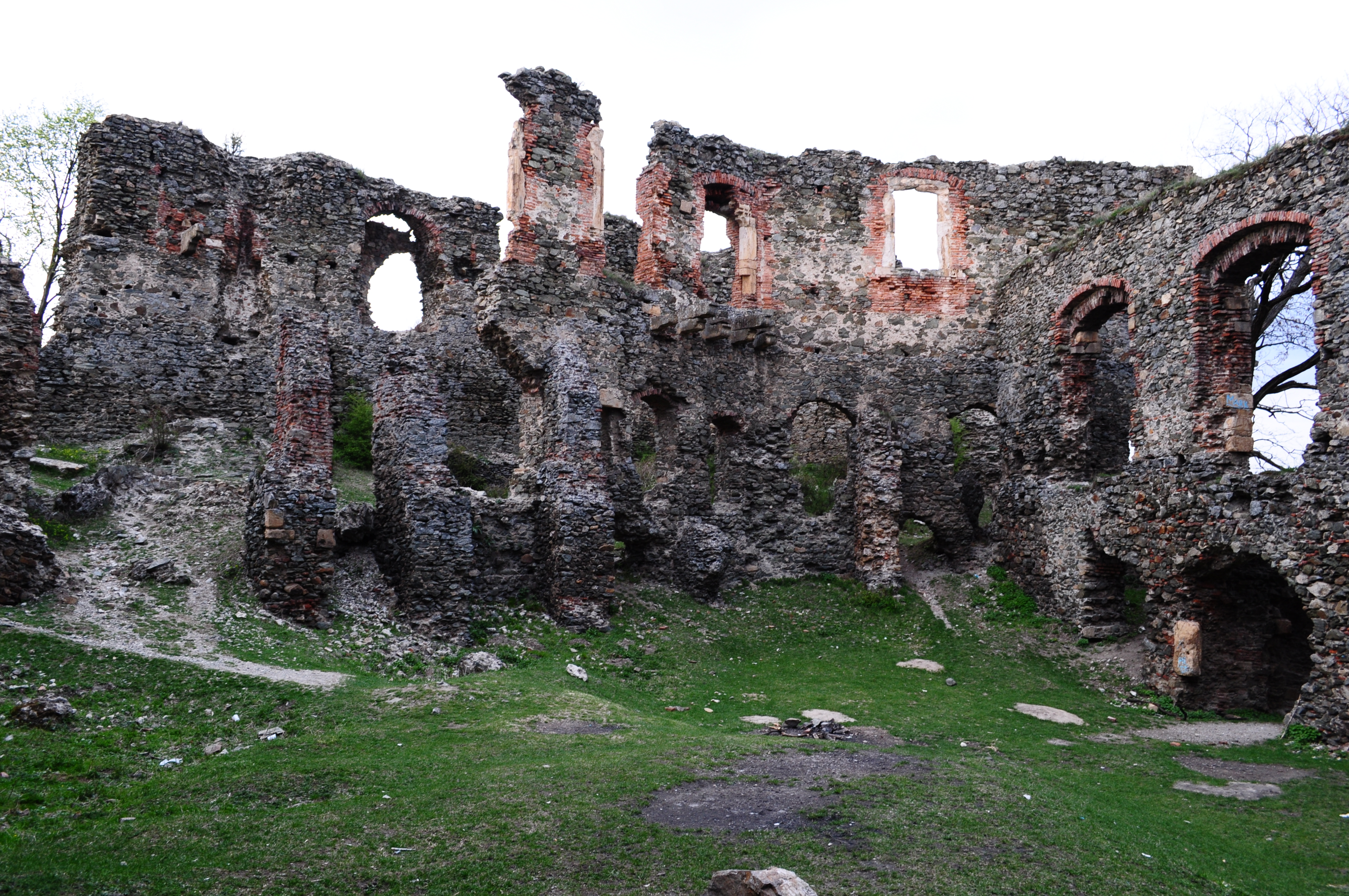 Cetatea Şoimoş (ruine)